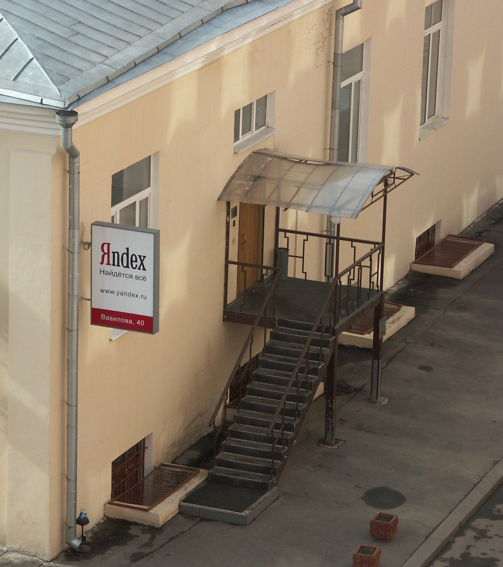 Офис Яндекса Author: User:Glaue2dk